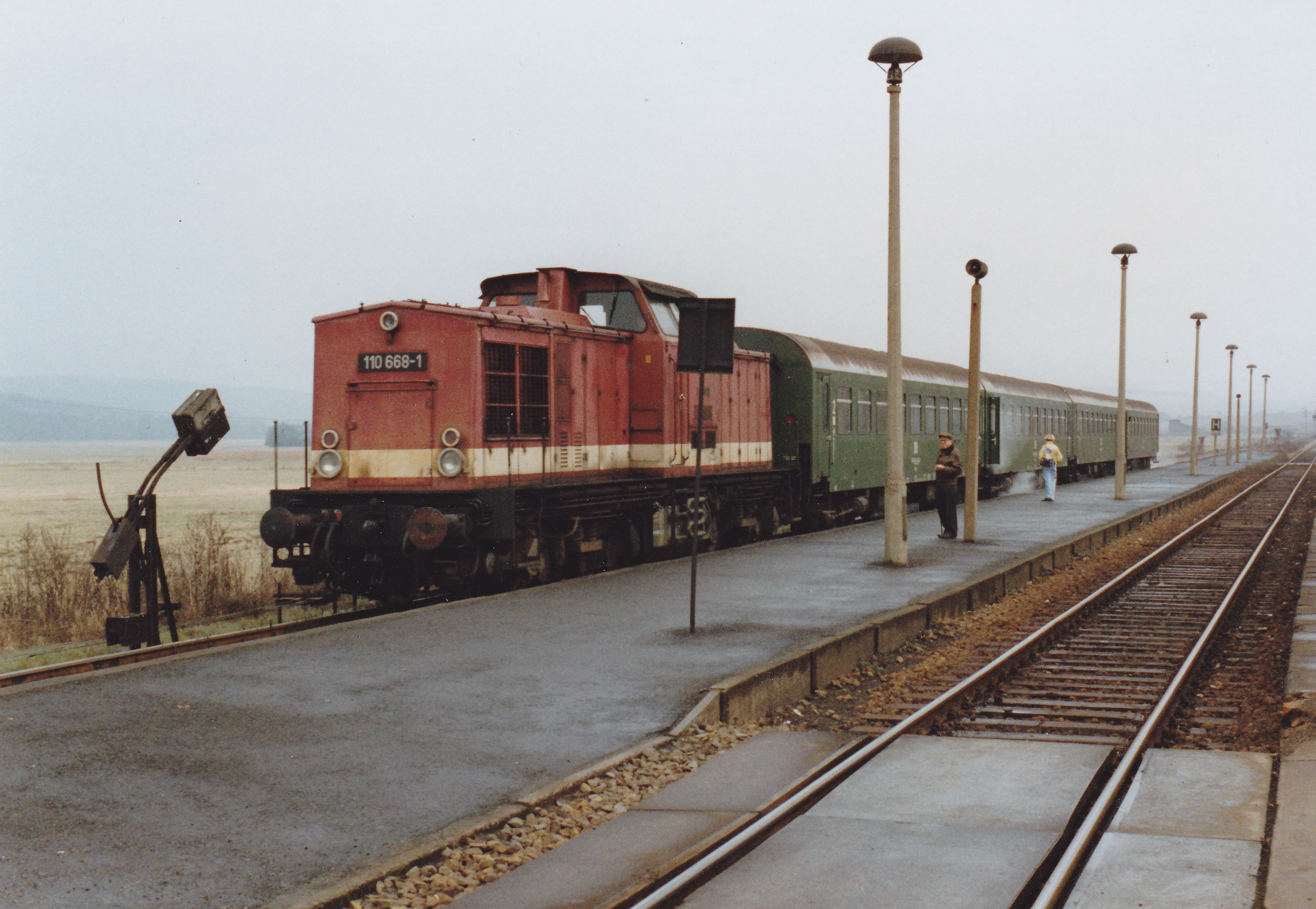 110 668 (Bw Eisenach) vor einem Vier-Wagen-Zug der Gattung Bghwe als N 17034 im Bf. Merkers. Die Zugkreuzung mit N 17005 aus Kaltennordheim musste abgewartet werden.